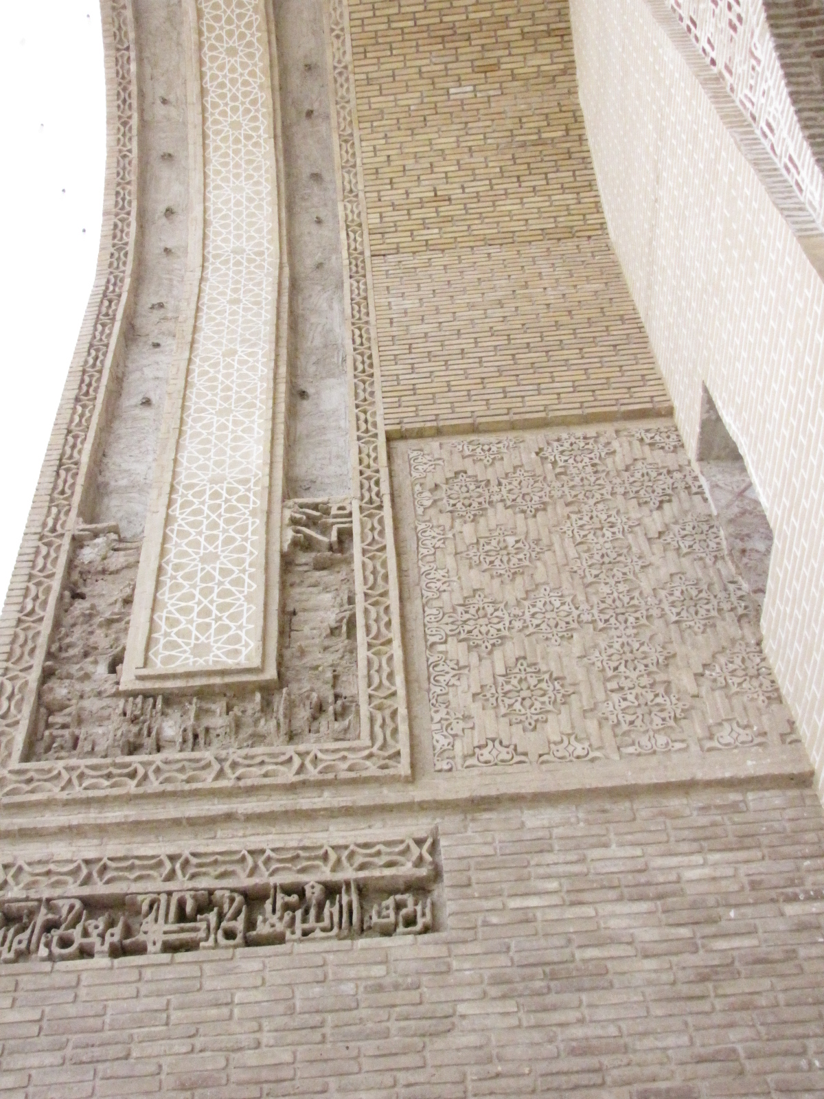 Malek mosque, Kerman, Iran (مسجد ملک کرمان)